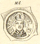 Münze (Bracteat) mit dem Bildnis des erwählten aber nie bestätigten Basler Fürstbischofs Lüthold II. von Rötteln (=Lutold); siehe hierzu Otto Roller: Der Basler Bischofstreit der Jahre 1309–1311, Basler Zeitschrift für Geschichte und Altertumskunde, Band 13 (1914), S. 300